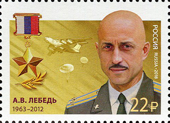 Герои Российской Федерации. А. В. Лебедь (1963—2012).